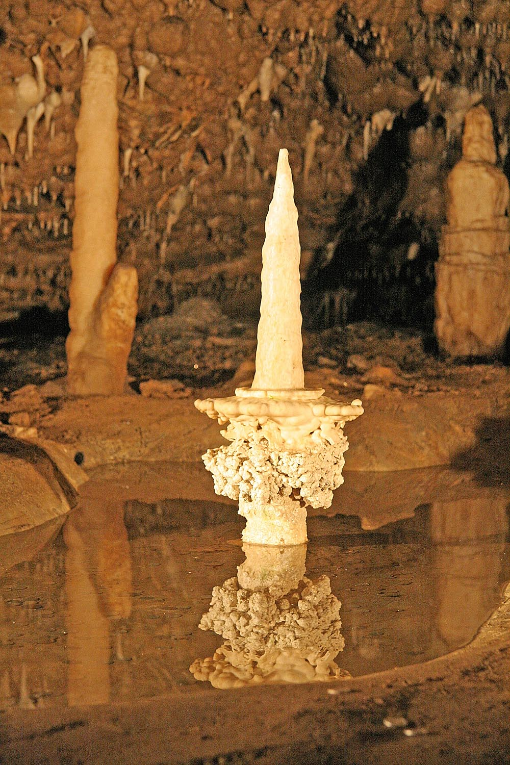 Sloupskosošůvské jeskyně - Sošůvské jeskyně - Brouškova pohádková síň - stalagmit Svícen